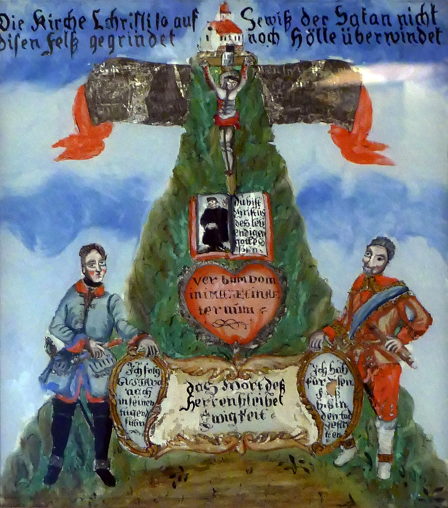 Symbole de la Réforme. Peinture sous-verre, Alsace, vers 1800. Exposition Vies protestantes : le mot et l'image au Musée alsacien de Strasbourg (2017).